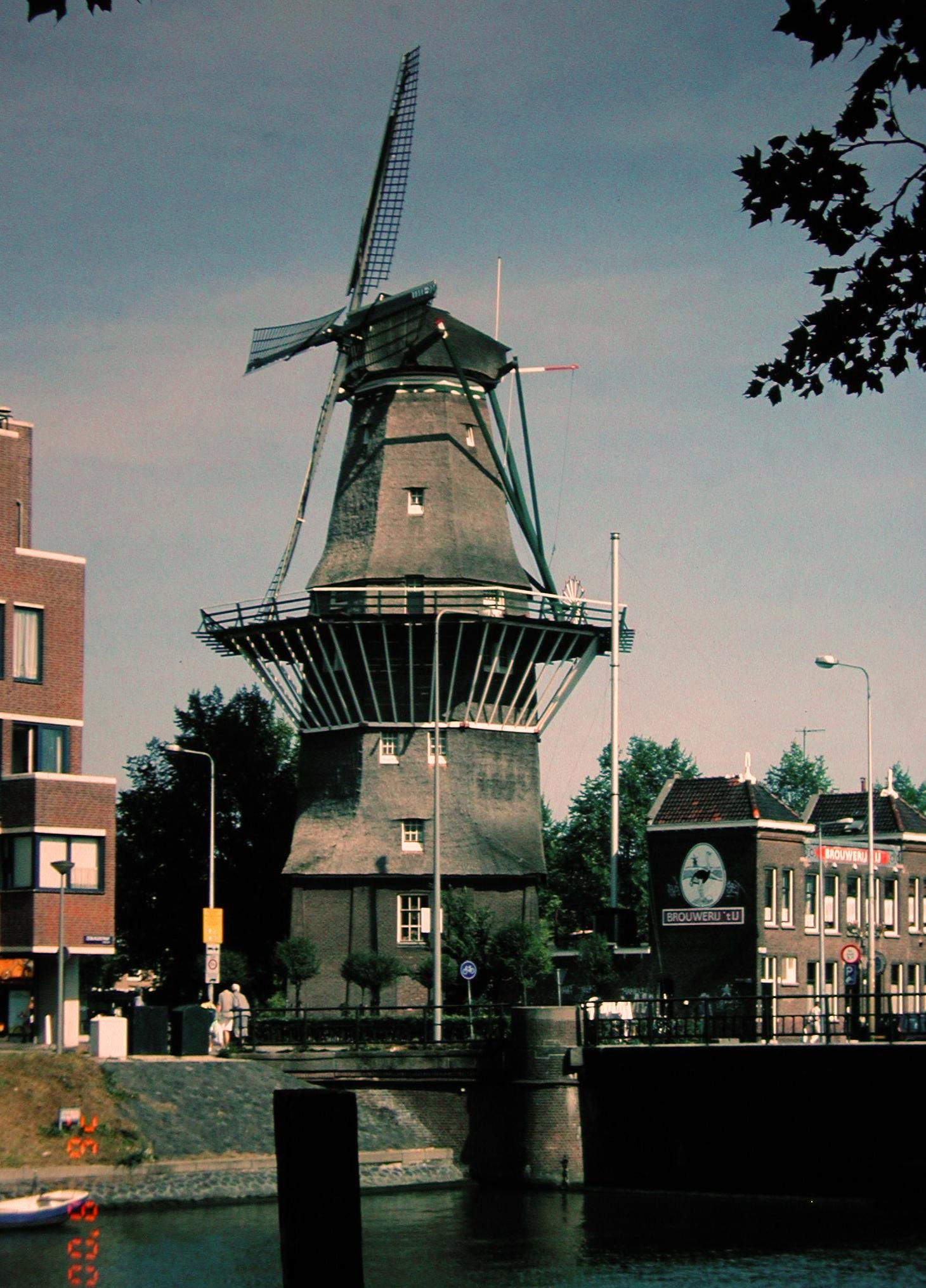 Molen De Gooyer te Amsterdam) Categorie:Afbeelding Amsterdam